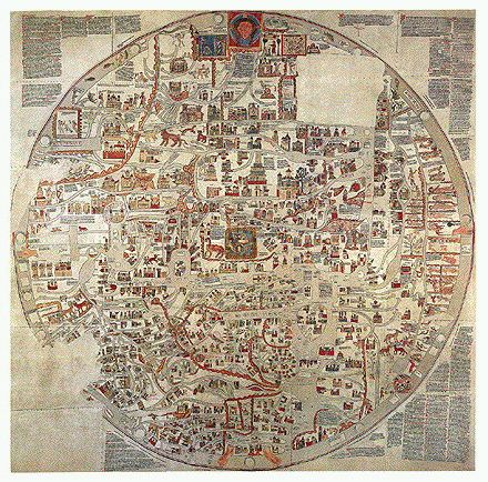 Die Ebstorfer Weltkarte ist die größte erhaltene mittelalterliche Weltkarte (mappa mundi). Sie ist nach ihrem Fundort, dem Benediktinerkloster Ebstorf in der Lüneburger Heide, benannt. (Laut Aussage des Projektleiters besteht kein Copyright auf dem Bild.)